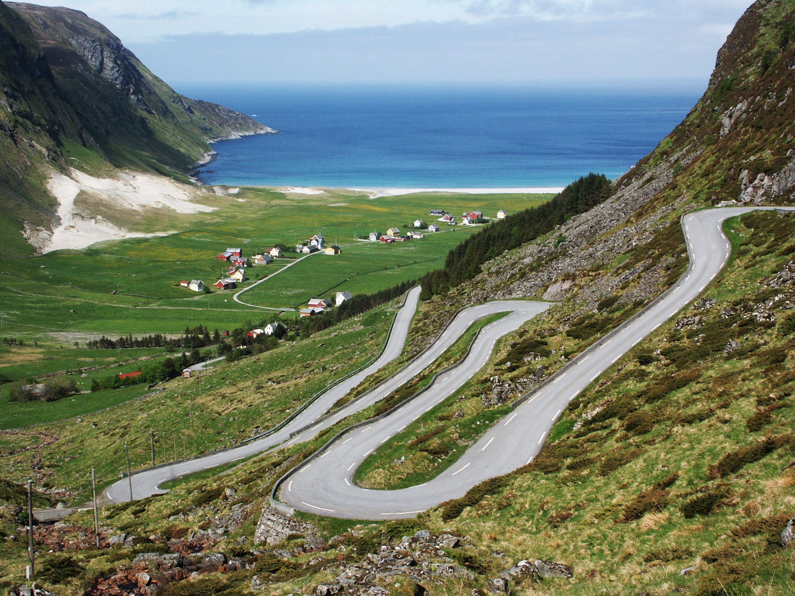 Hoddevik, Stadtlandet